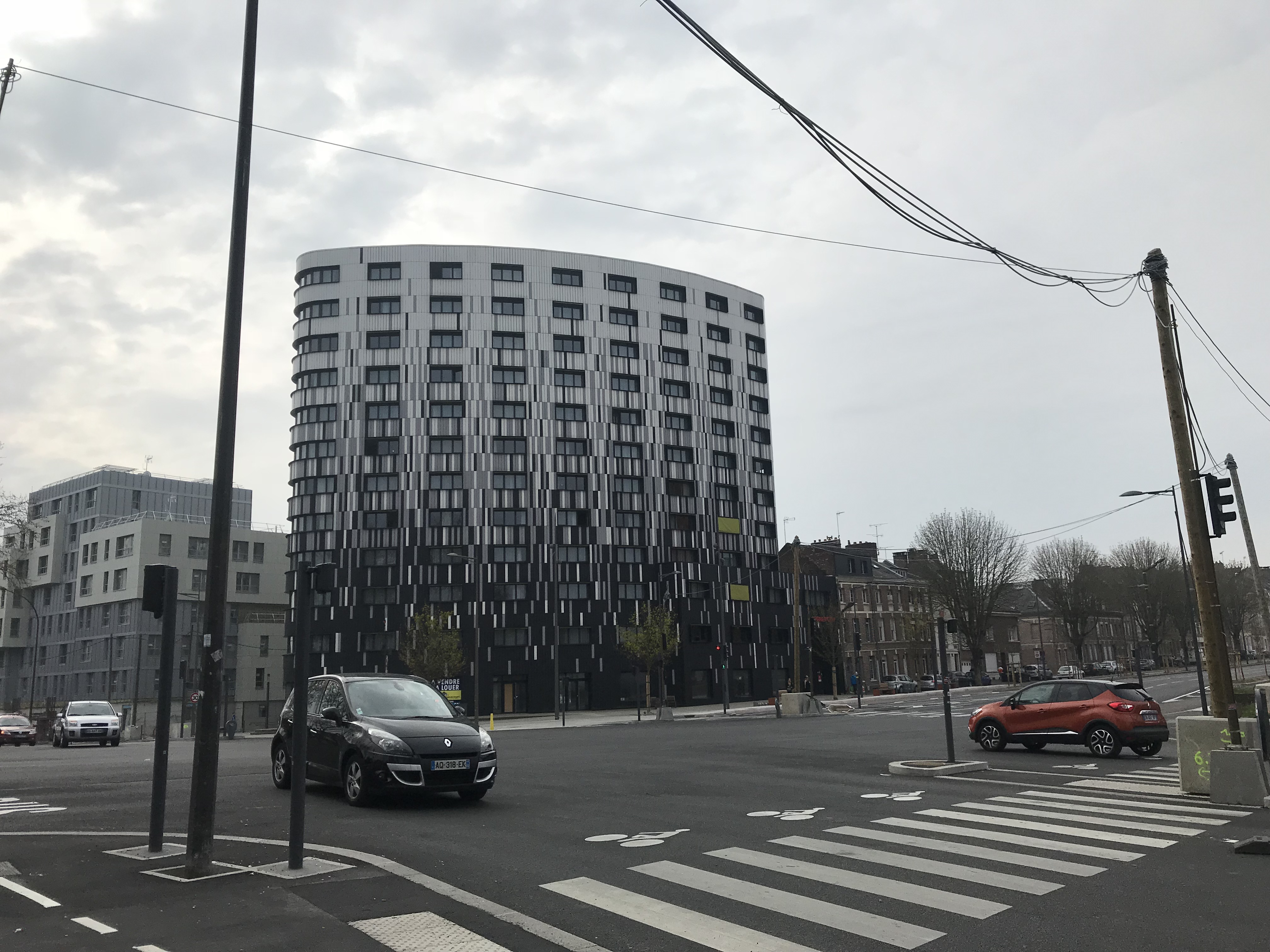 中文（中国大陆）: 亚眠的一处写字楼